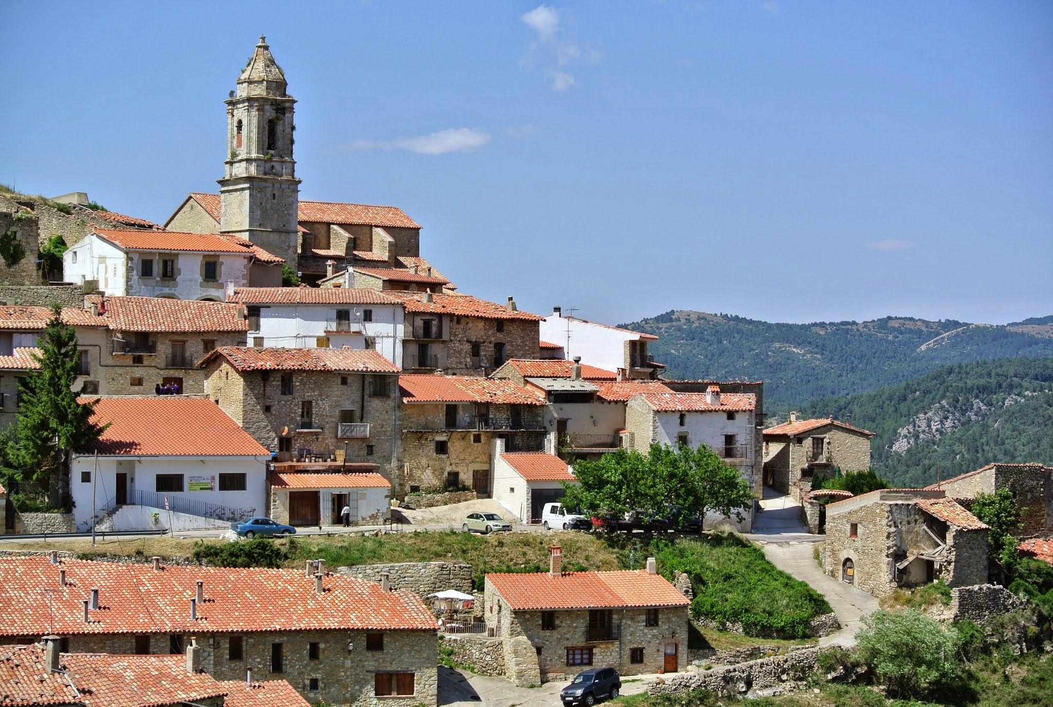 La Pobla de Benifassà, 12599, Castellón, Spain